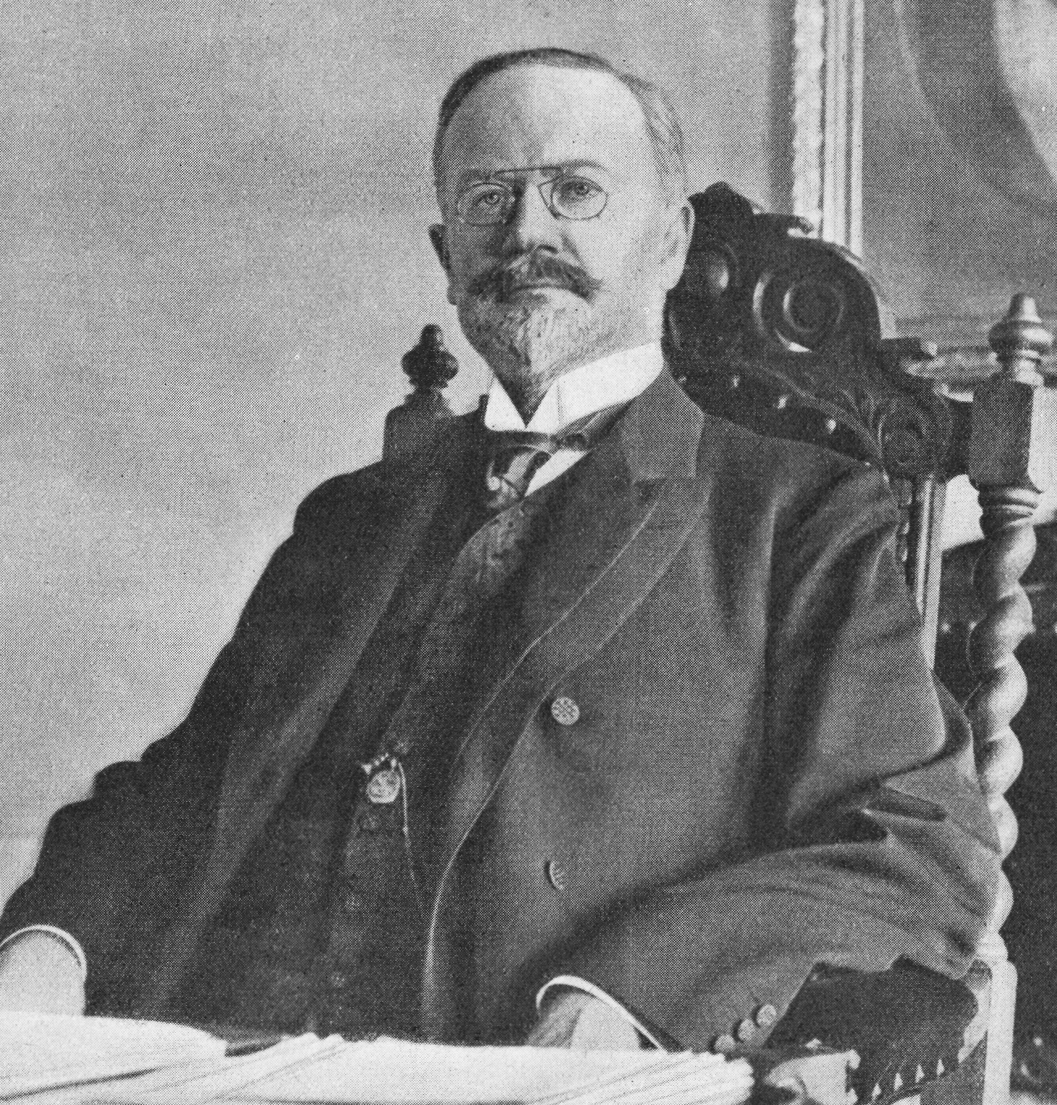 Karl Rydin (1854-1912) på omslaget till Hvar 8 Dag 1912.